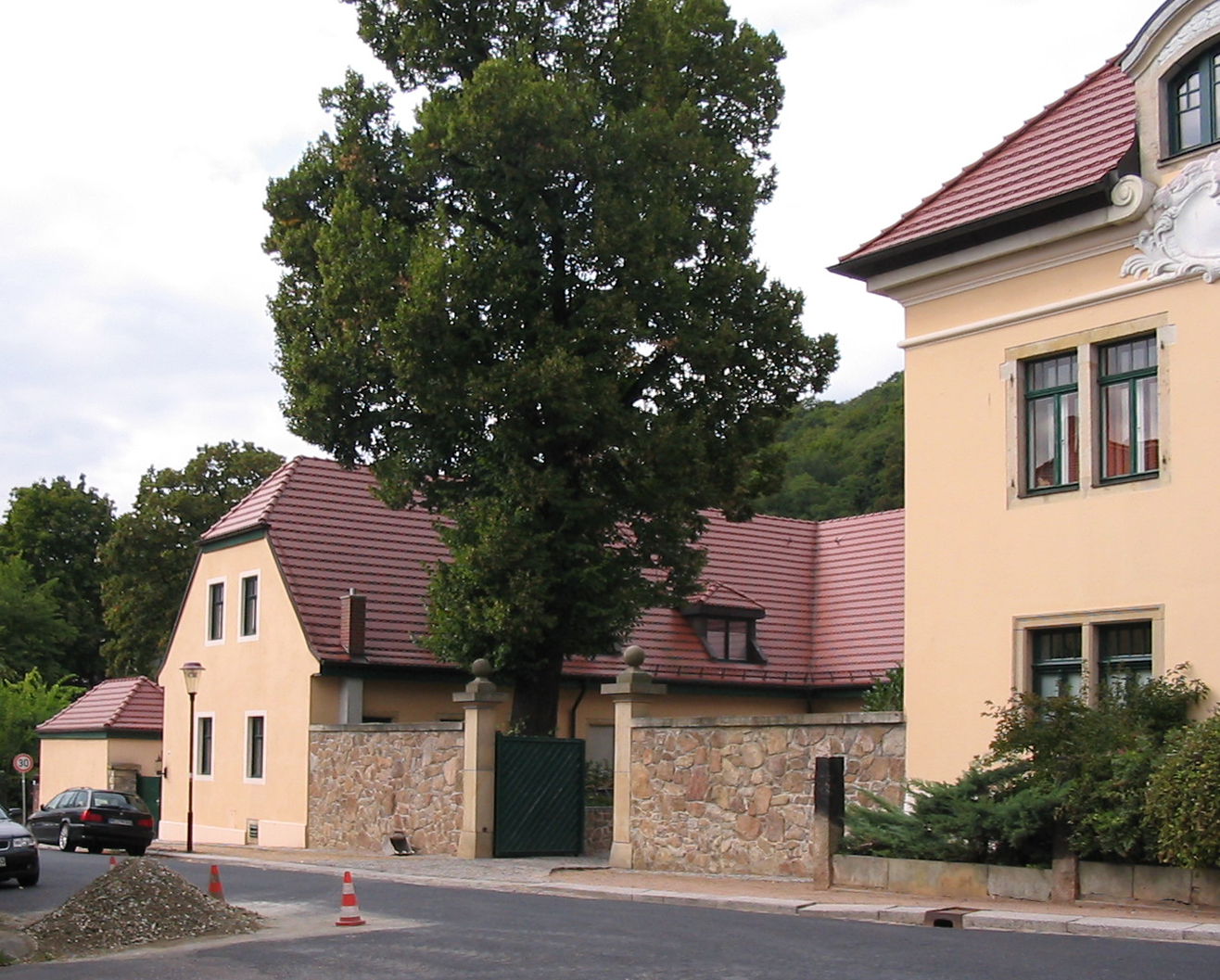 Radebeul, Haus Windisch, Winzerhaus